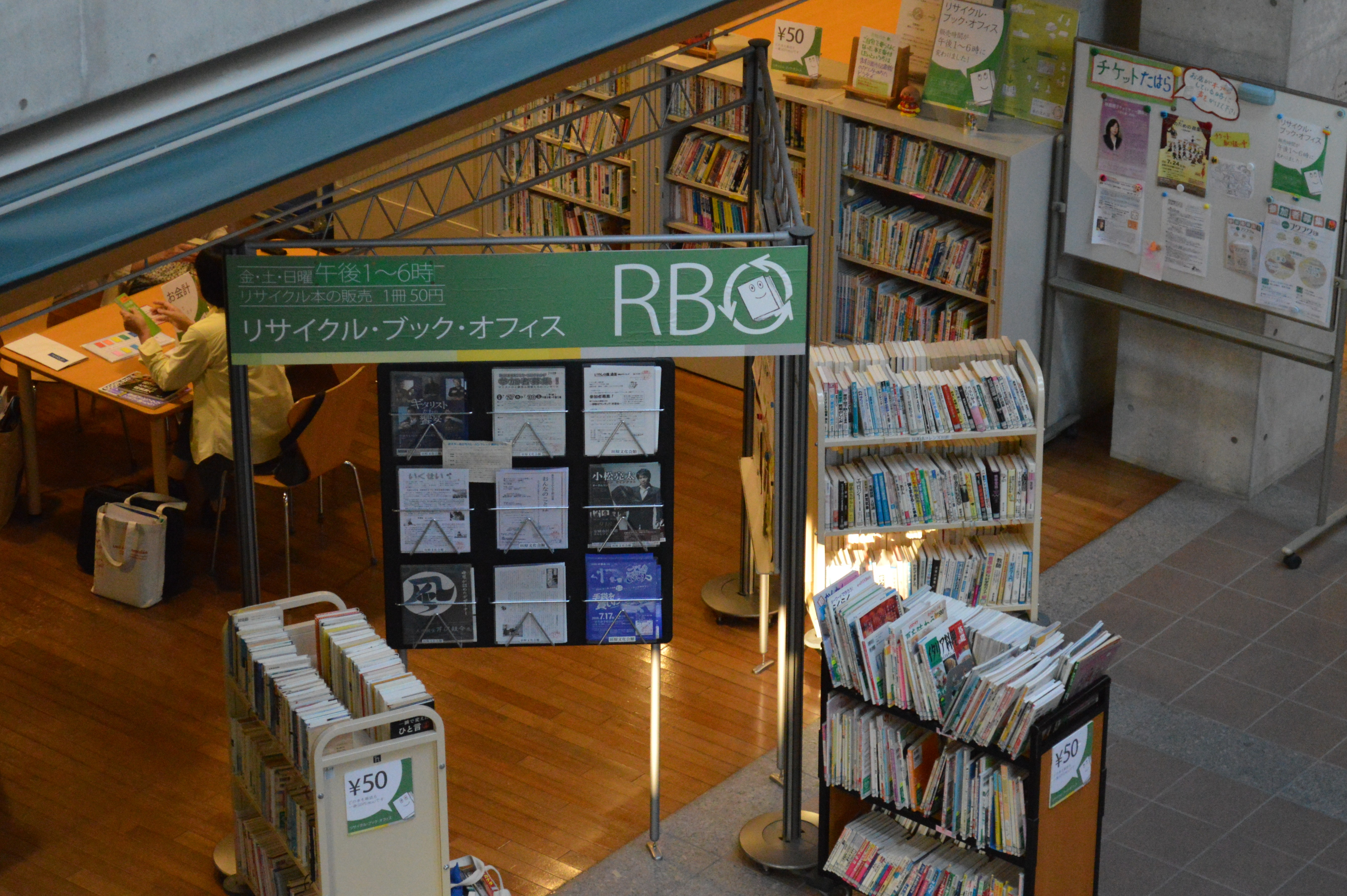 愛知県田原市 田原市中央図書館（田原市図書館）の入口近くに設置されたリサイクルブックオフィス（管理運営は田原市図書館サポーターズおおきなかぶ）